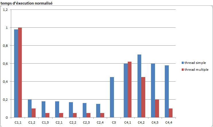 Résultat test CPU élasticité cluster